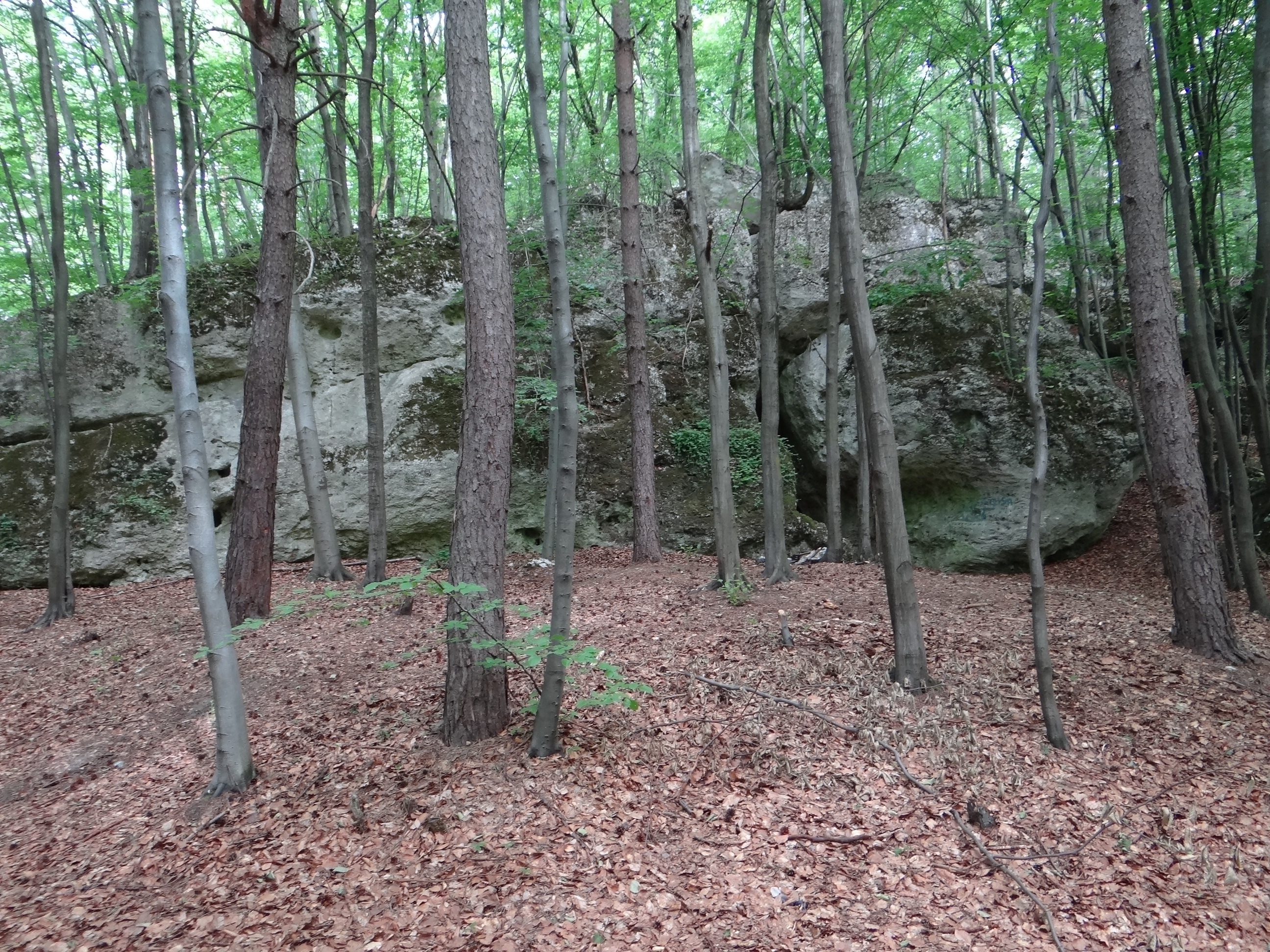 Fragment Muru Łężyckiego z Dziadową Skałą